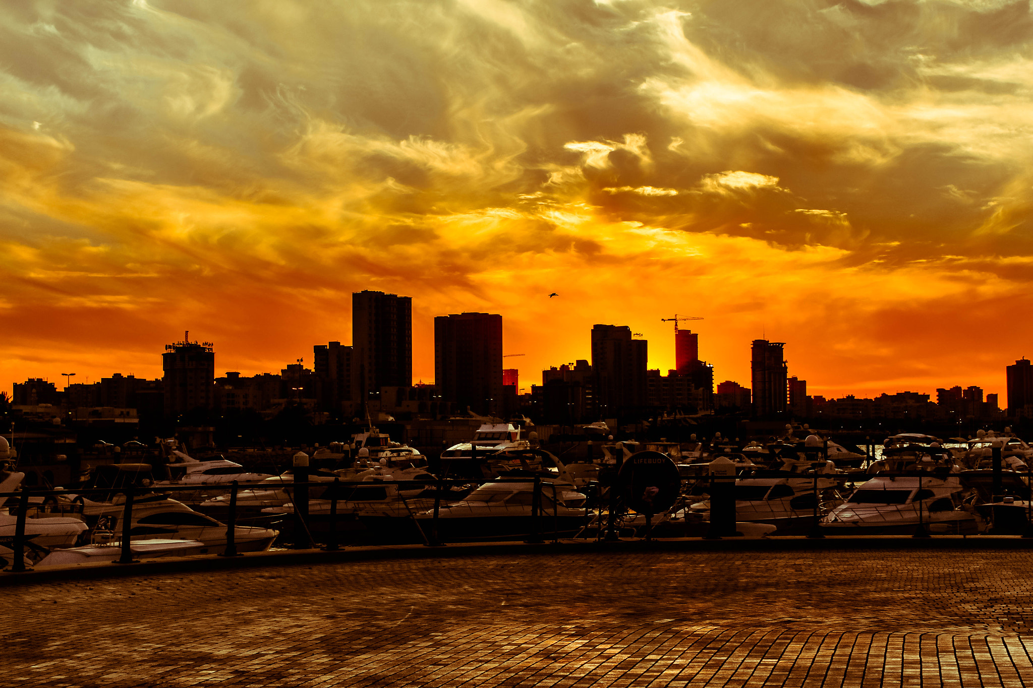 500px provided description: Sunset [#red ,#sunset ,#kuwait ,#q8 ,#alrefaei]